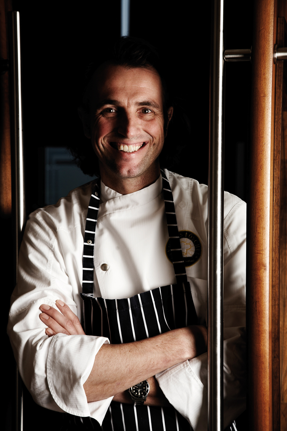 Andreas Pöschel, Foodstylist und Koch, Bielefeld